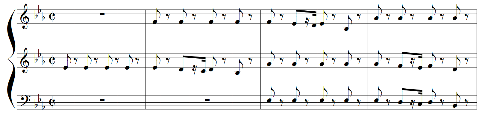 Anton Reicha - sujet de la fugue n°32 des 36 fugues, op.36